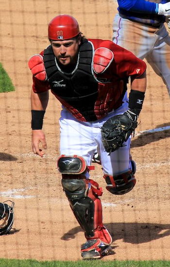 Konrad Schmidt